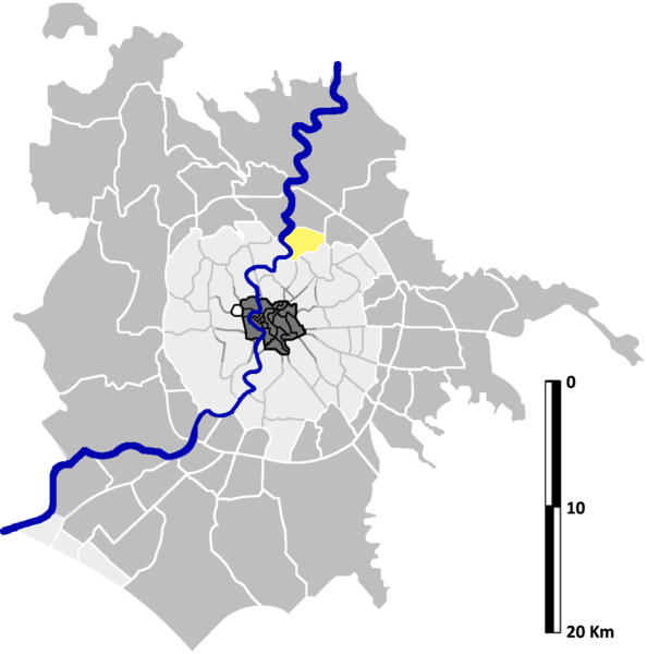 Val Melaina